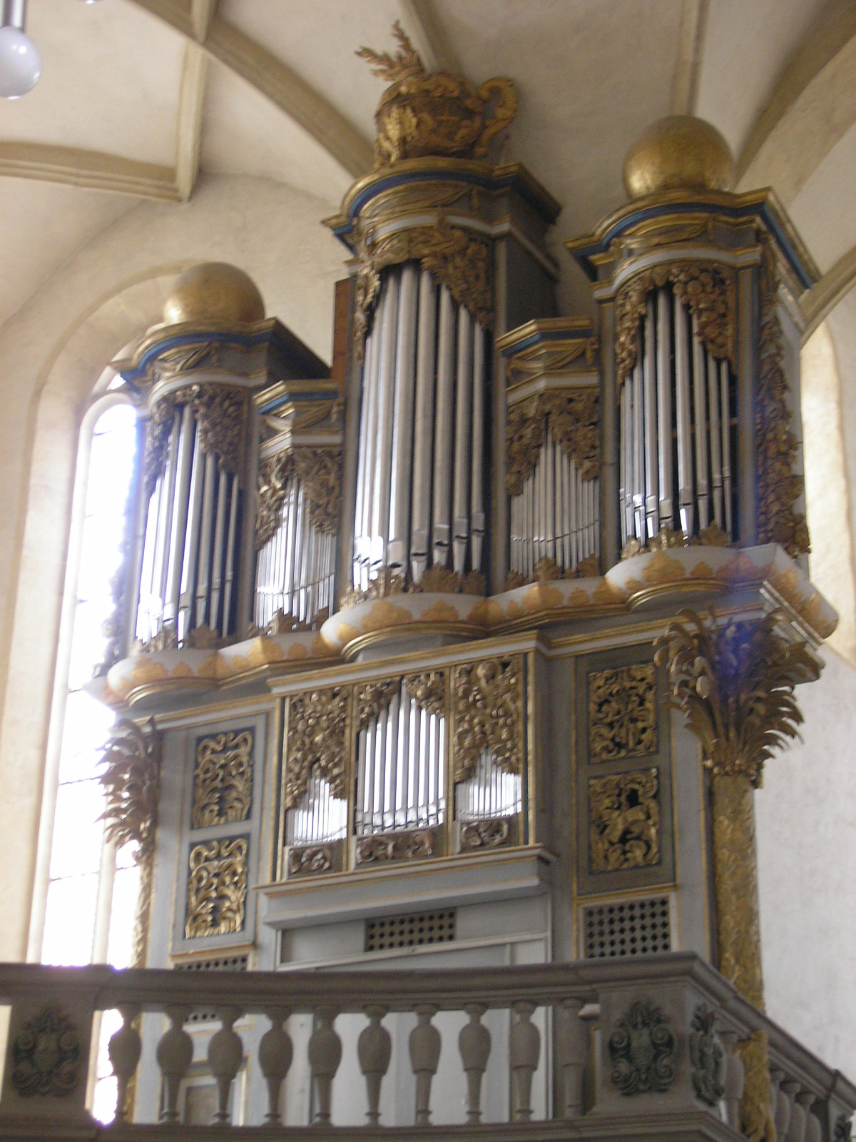 Eine Orgel des Zeitzer Doms.